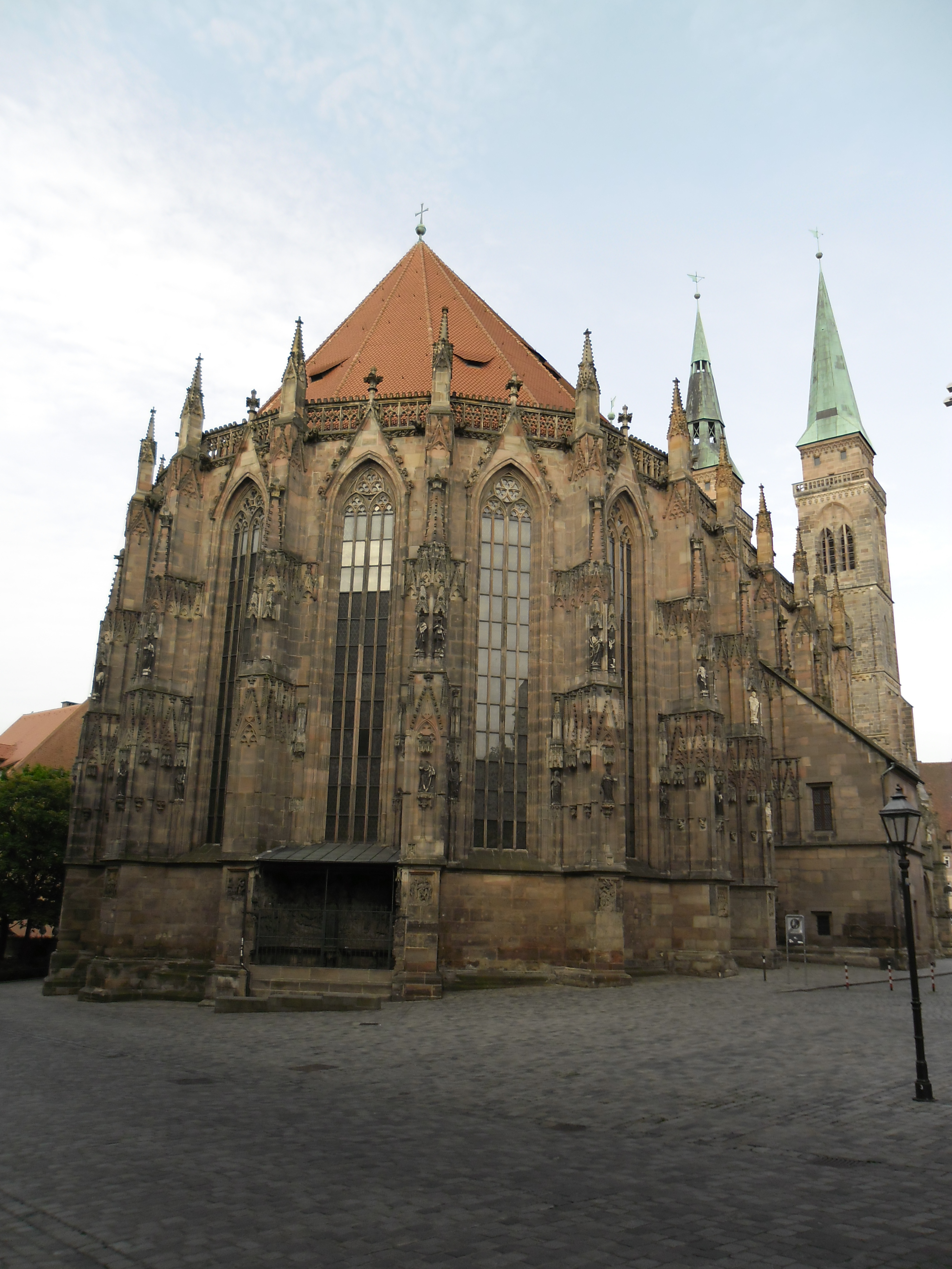 Blick auf die Sebaldskirche von Osten